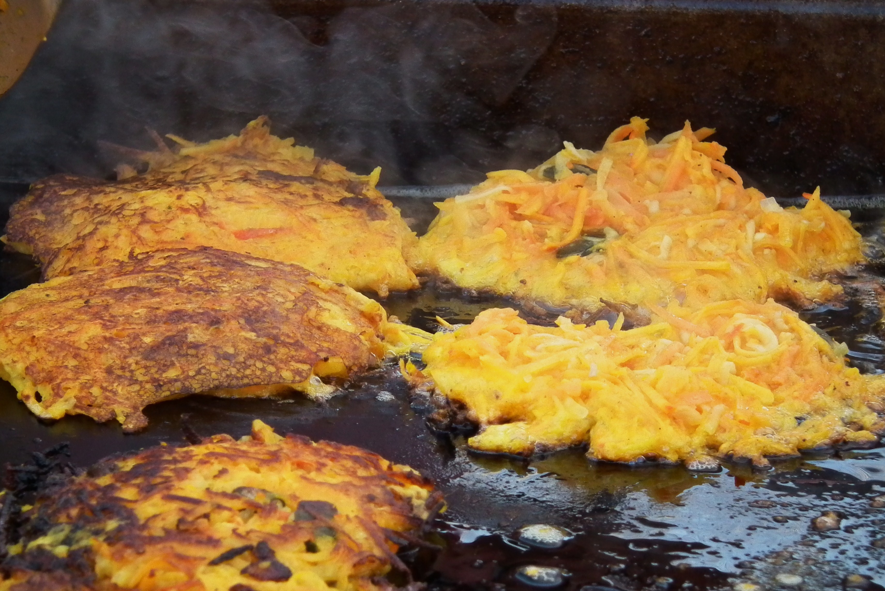 Rösti, fotografiert auf einem Wochenmarkt in Karlsruhe (Baden-Württemberg, Deutschland)